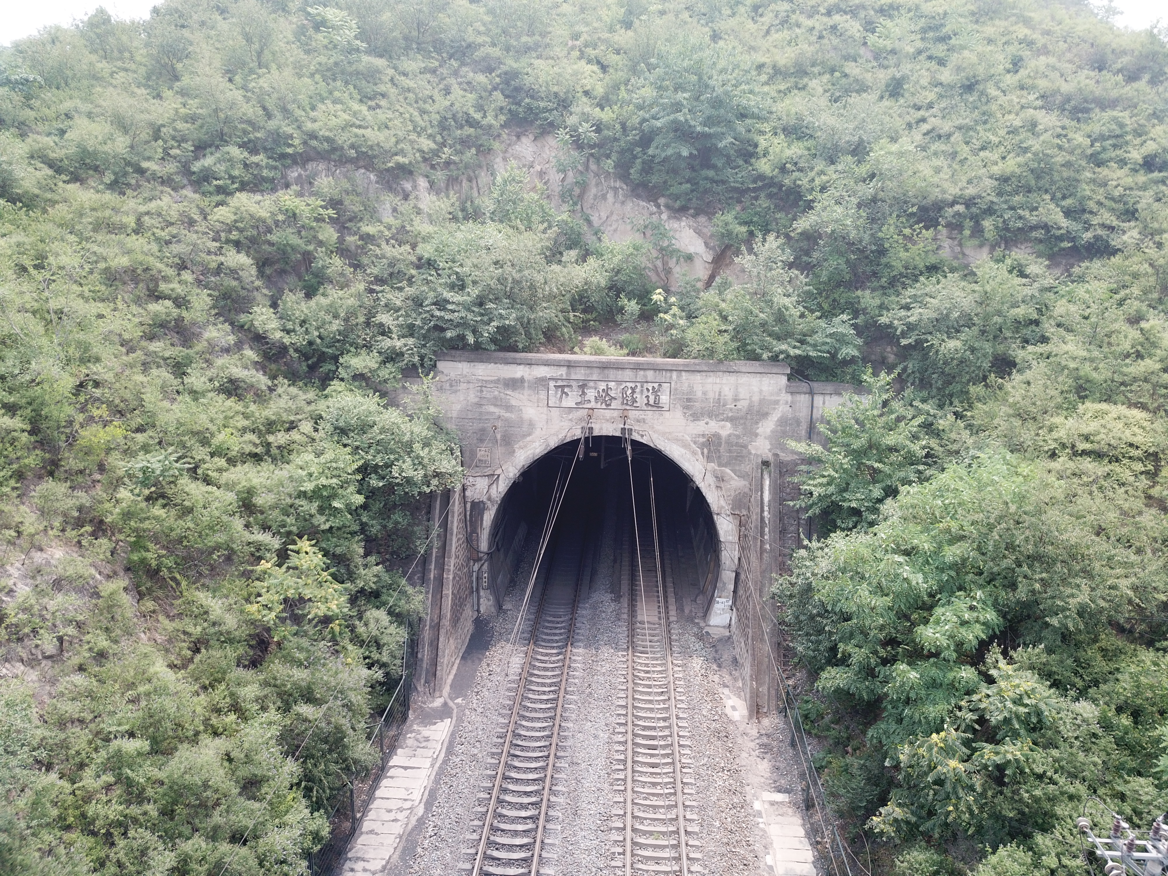 中文（中国大陆）: 下王峪隧道